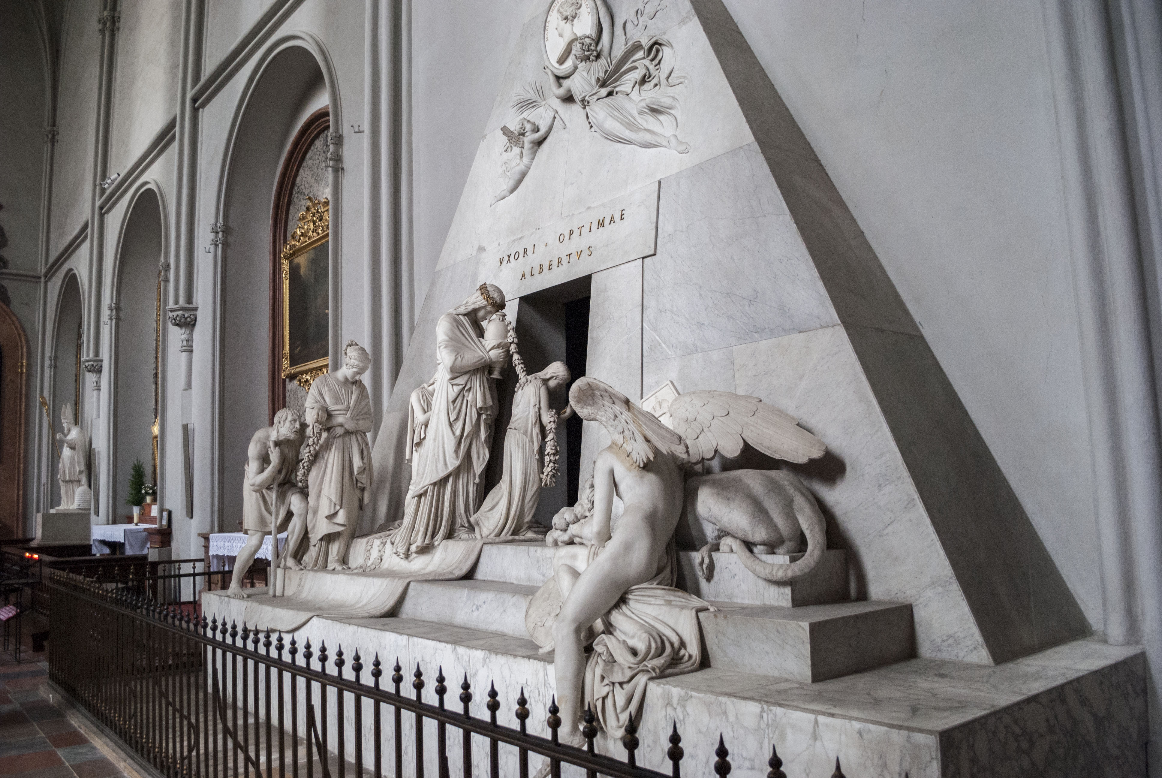 Augustinerkirche, ehem. Hofpfarrkirche hl. Augustin